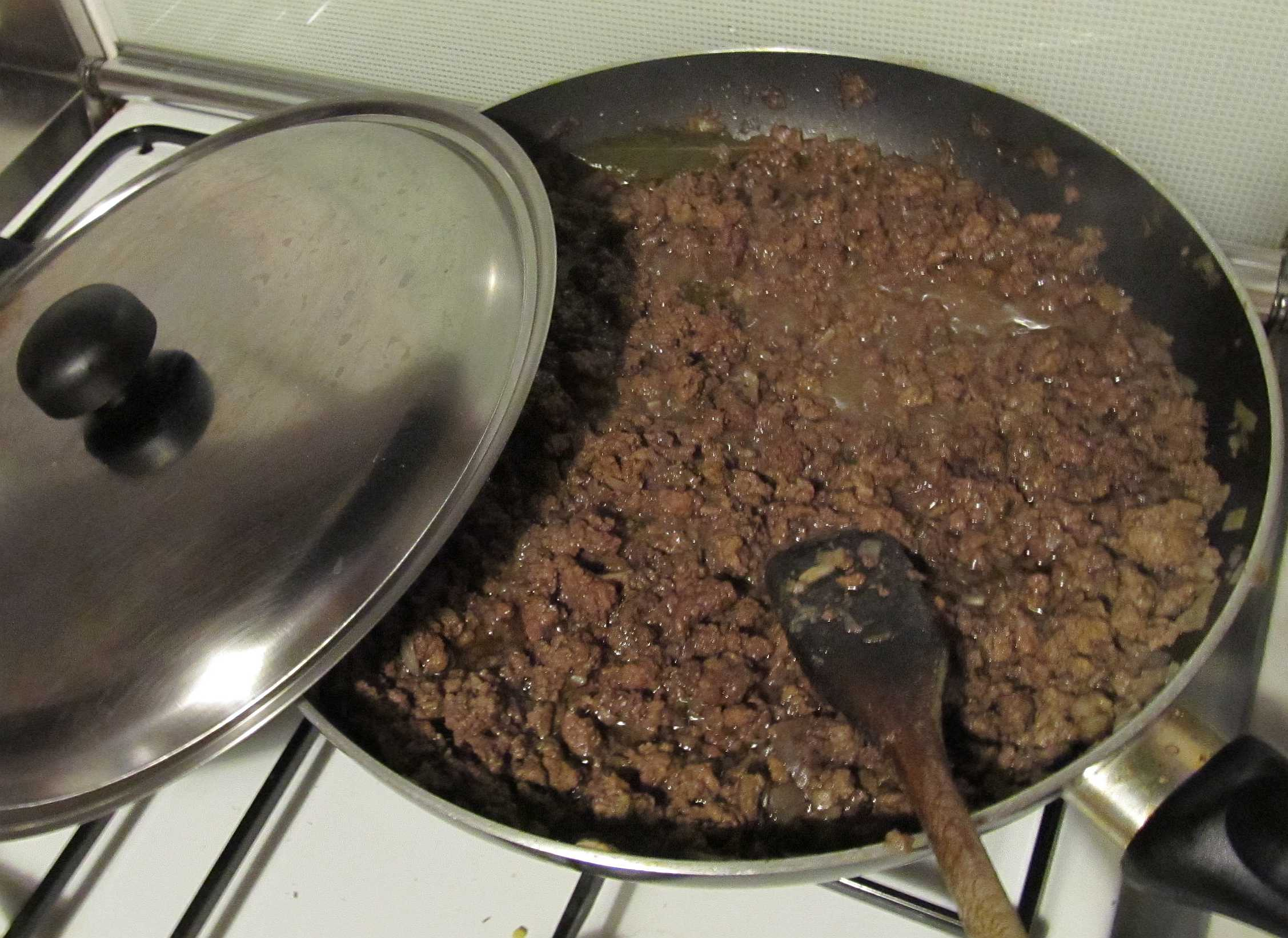 Preparazione del tapulòn: completamento cottura